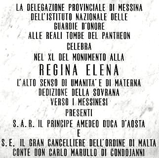 Lapide di riconoscimento onorifico alla regina Elena di Montenegro.